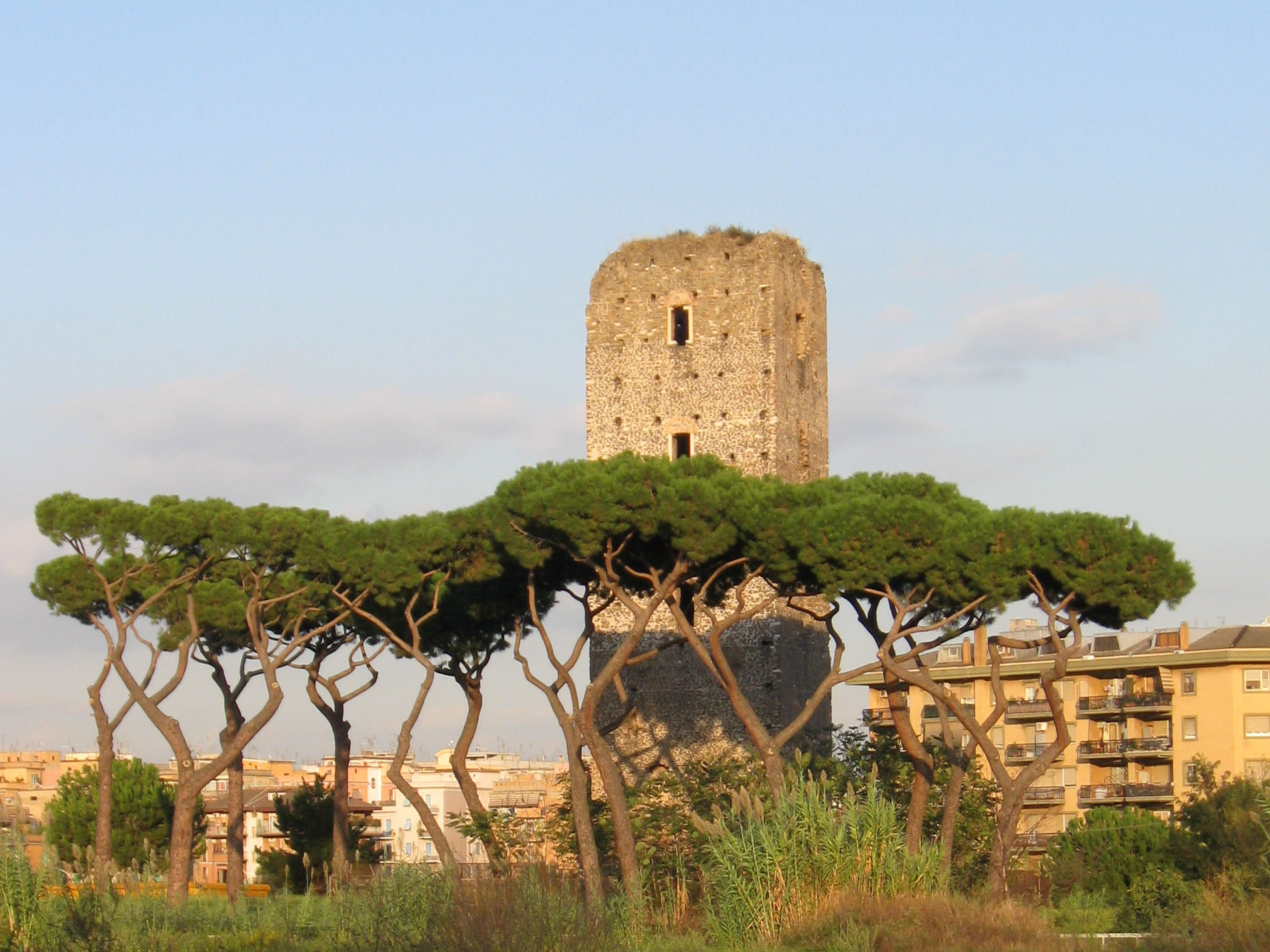 Torre di Centocelle